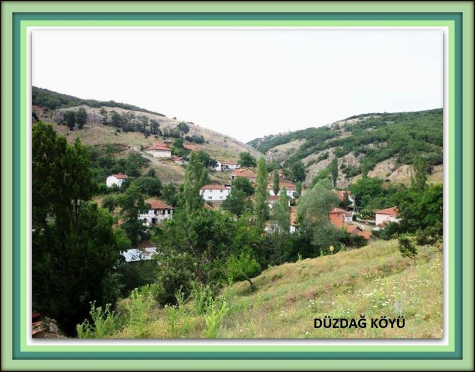 düzdağ köyü